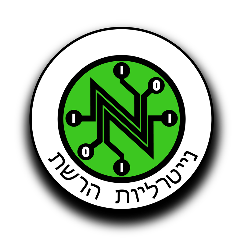 ניטרליות הרשת - סמל